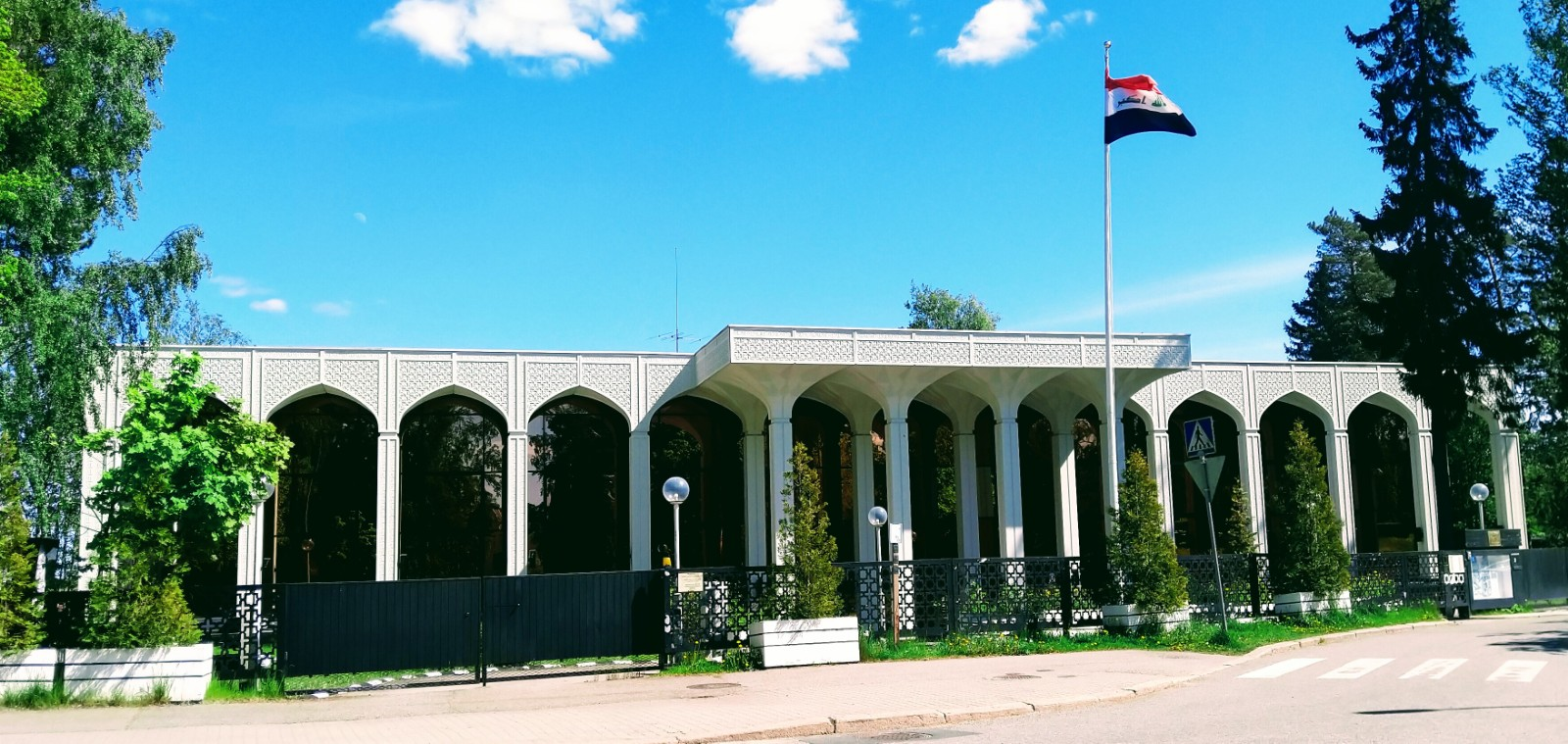 Irakin suurlähetystö, Helsinki.